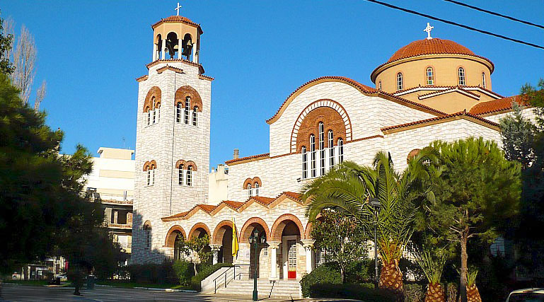 Pallini